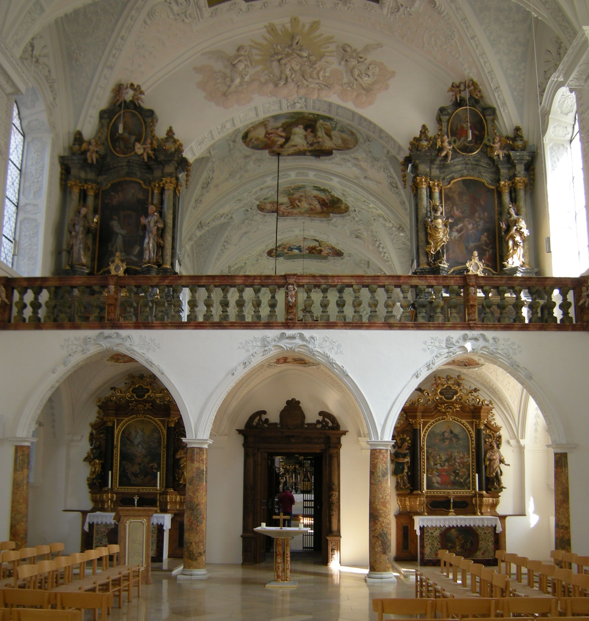 Buxheim (Schwaben) - Klosterkirche St. Maria.